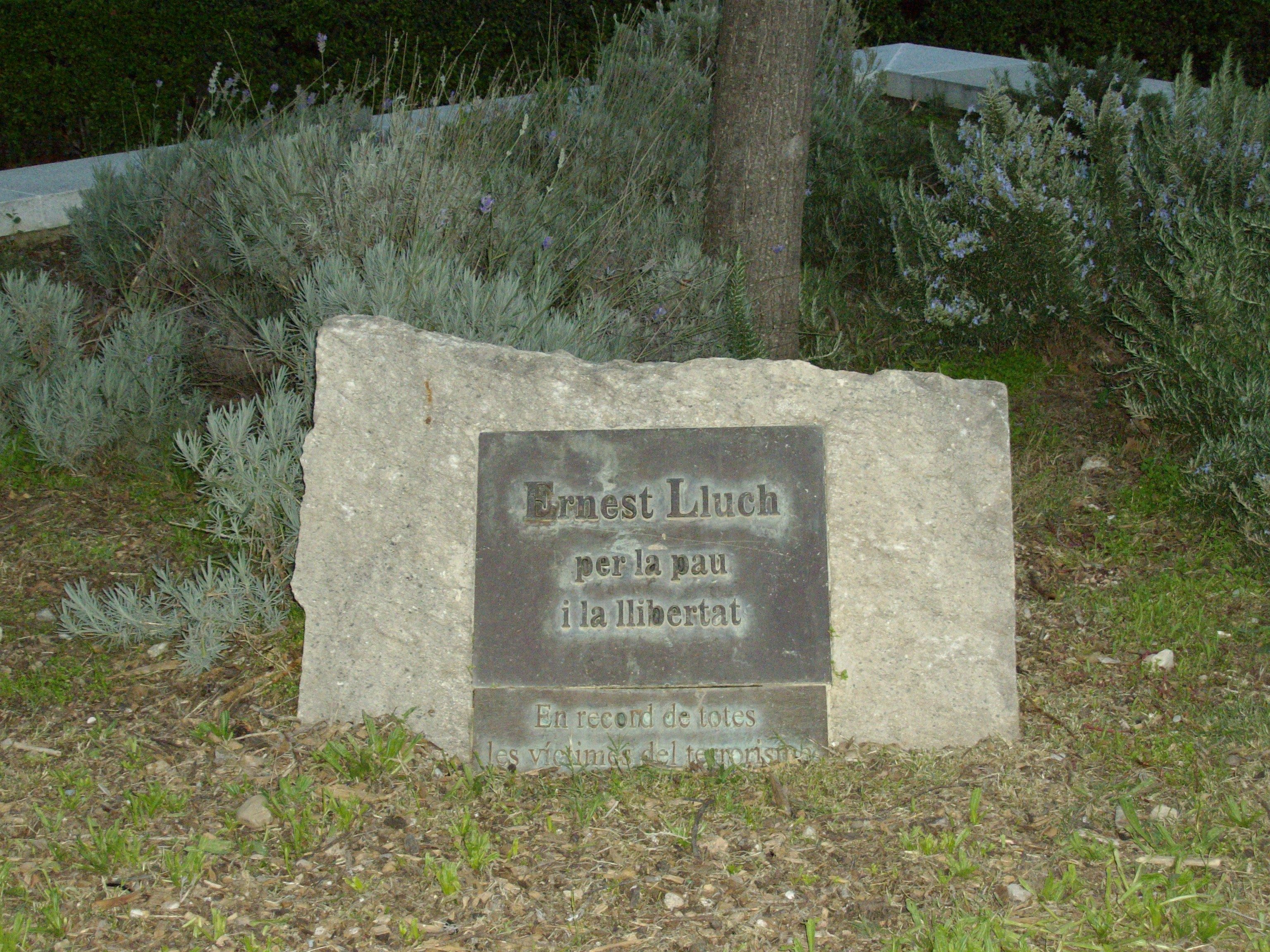 Memorial a Ernest Lluch, político catalán asesinado por la banda terrorista ETA en el año 2000, el monumento fue erigido en el 2001, en la plaza que lleva su nombre, en el parque de Cataluña, en Sabadell, Barcelona (España). El 8 de diciembre de 2005, coincidiendo con el 15 aniversario del atentado terrorista en Sabadell en el que perdieron la vida seis miembros de la Policía Nacional, fue colocada otra placa en el mismo monolito, en la que dice "En record de totes les víctimes del terrorisme" ("En recuerdo de todas las víctimas del terrorismo").